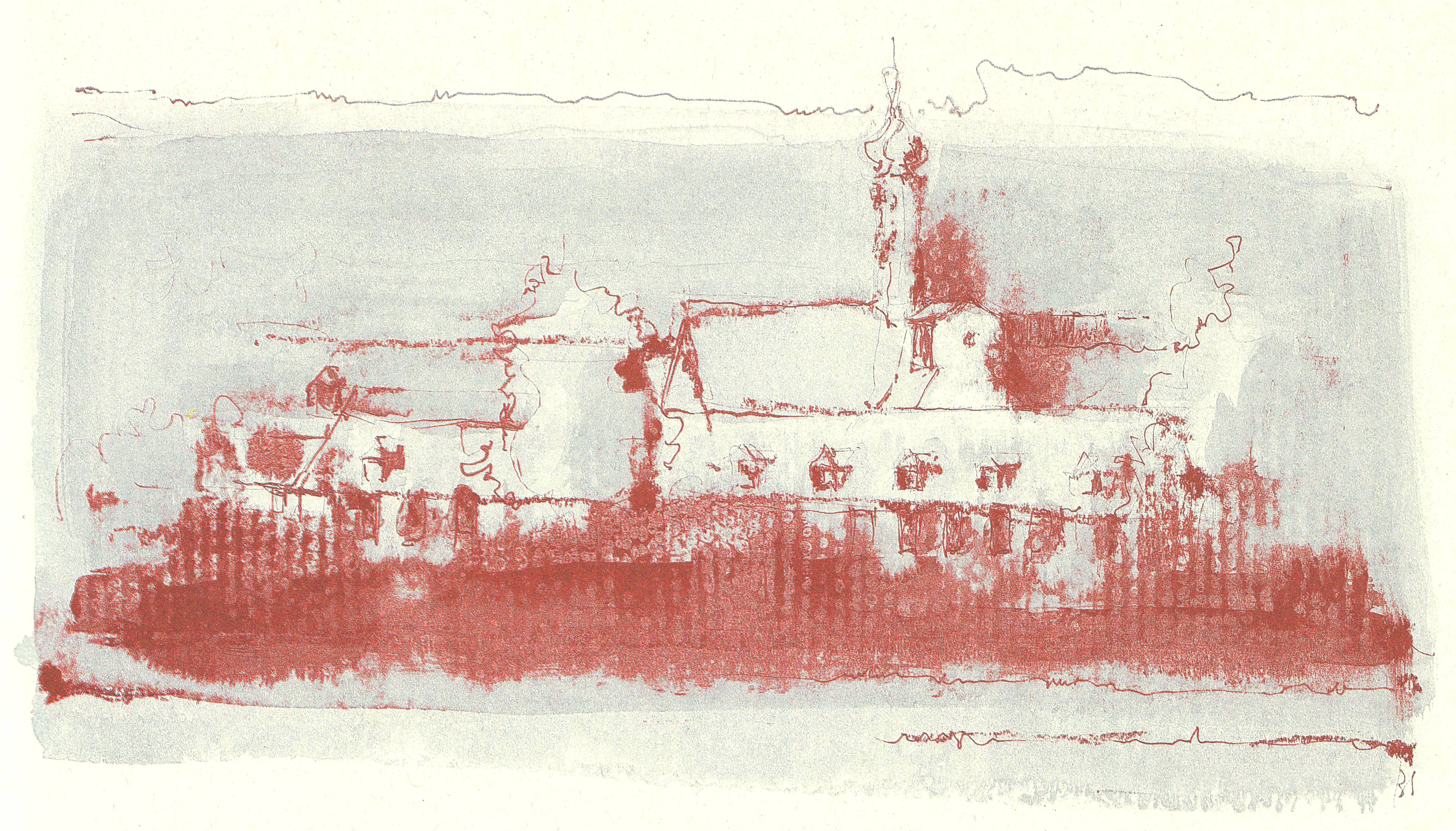 Kloster Wettingen, Zeichnung von Benno Schulthess, Feder, Kohle und Pastell auf Papier, mit Tusche laviert